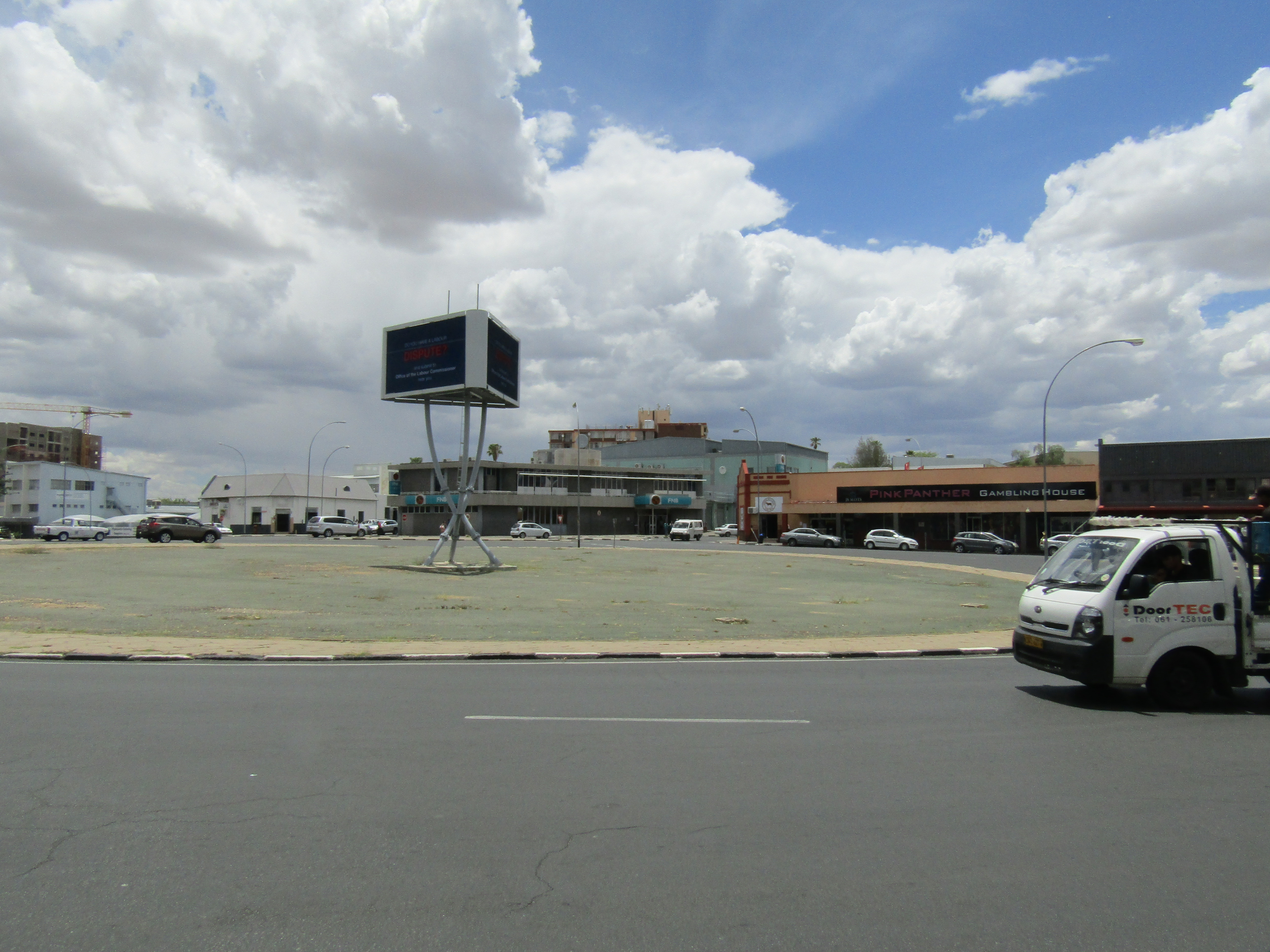 Blick auf den Ausspannplatz in Windhoek, Namibia (Dezember 2016)